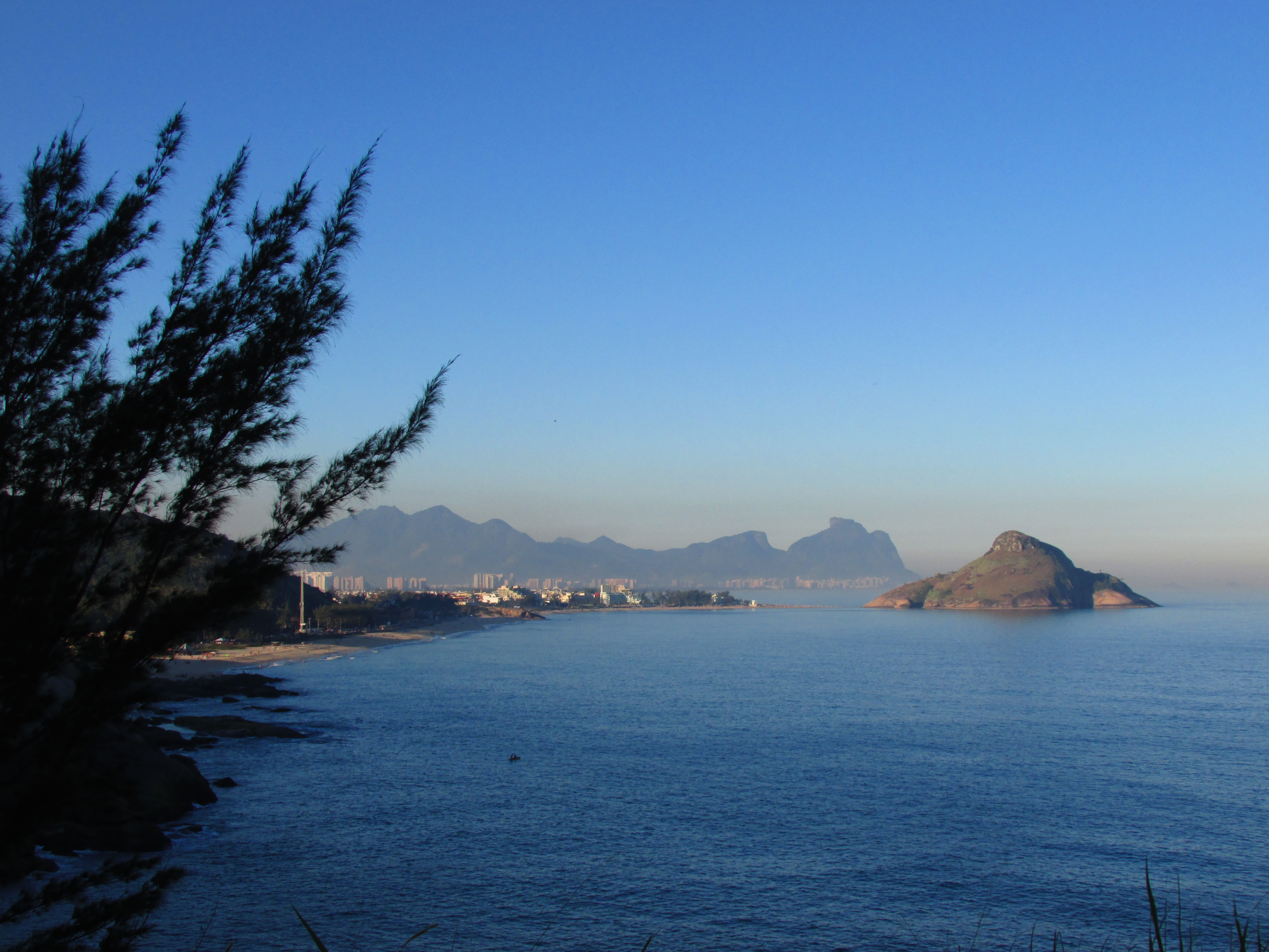 Litoral de mata atlântica pertencente ao Parque da Pedra Branca - ao fundo a Floresta da Tijuca